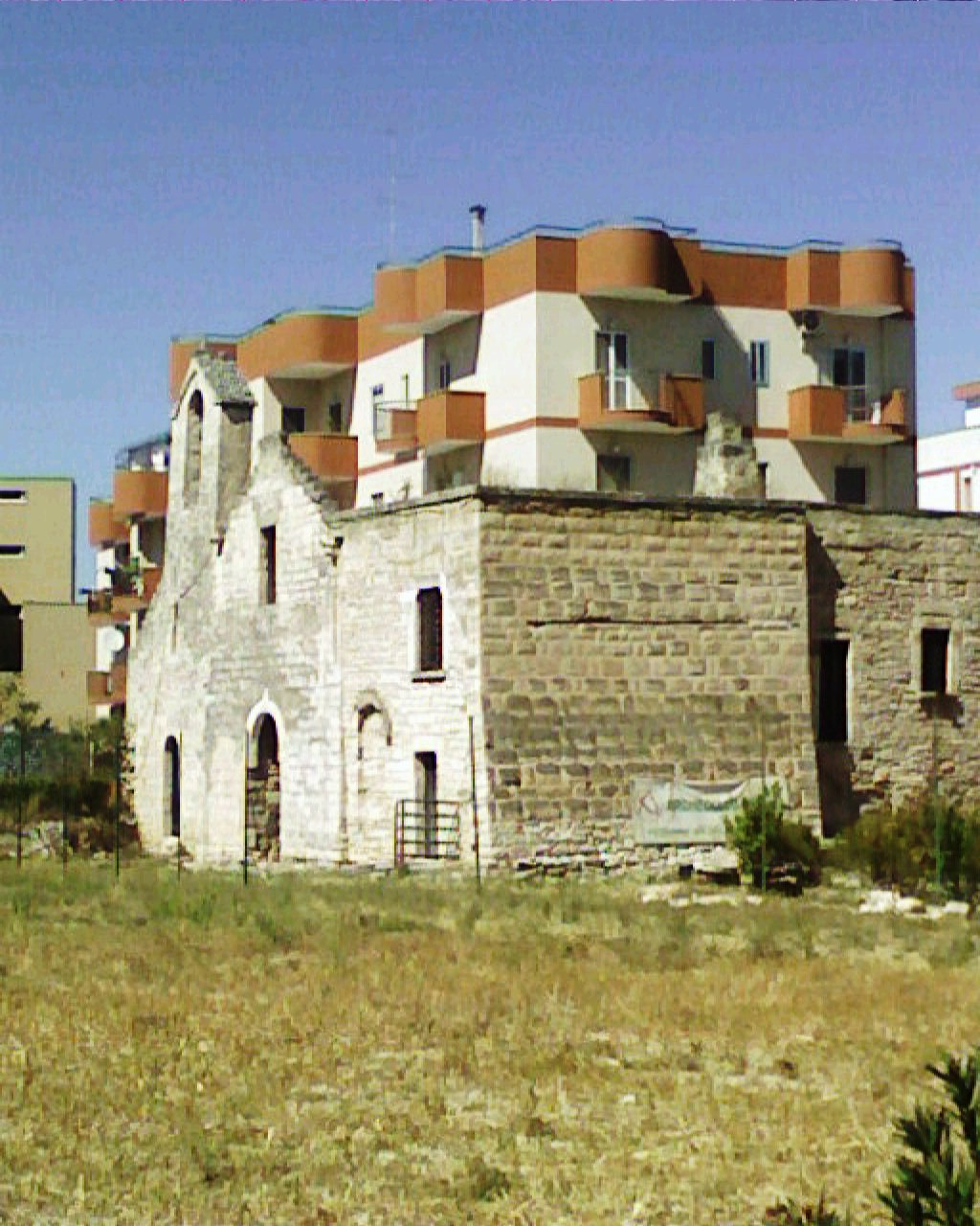 chiesa di santa maria di modugno - Modugno (bari)-Italy